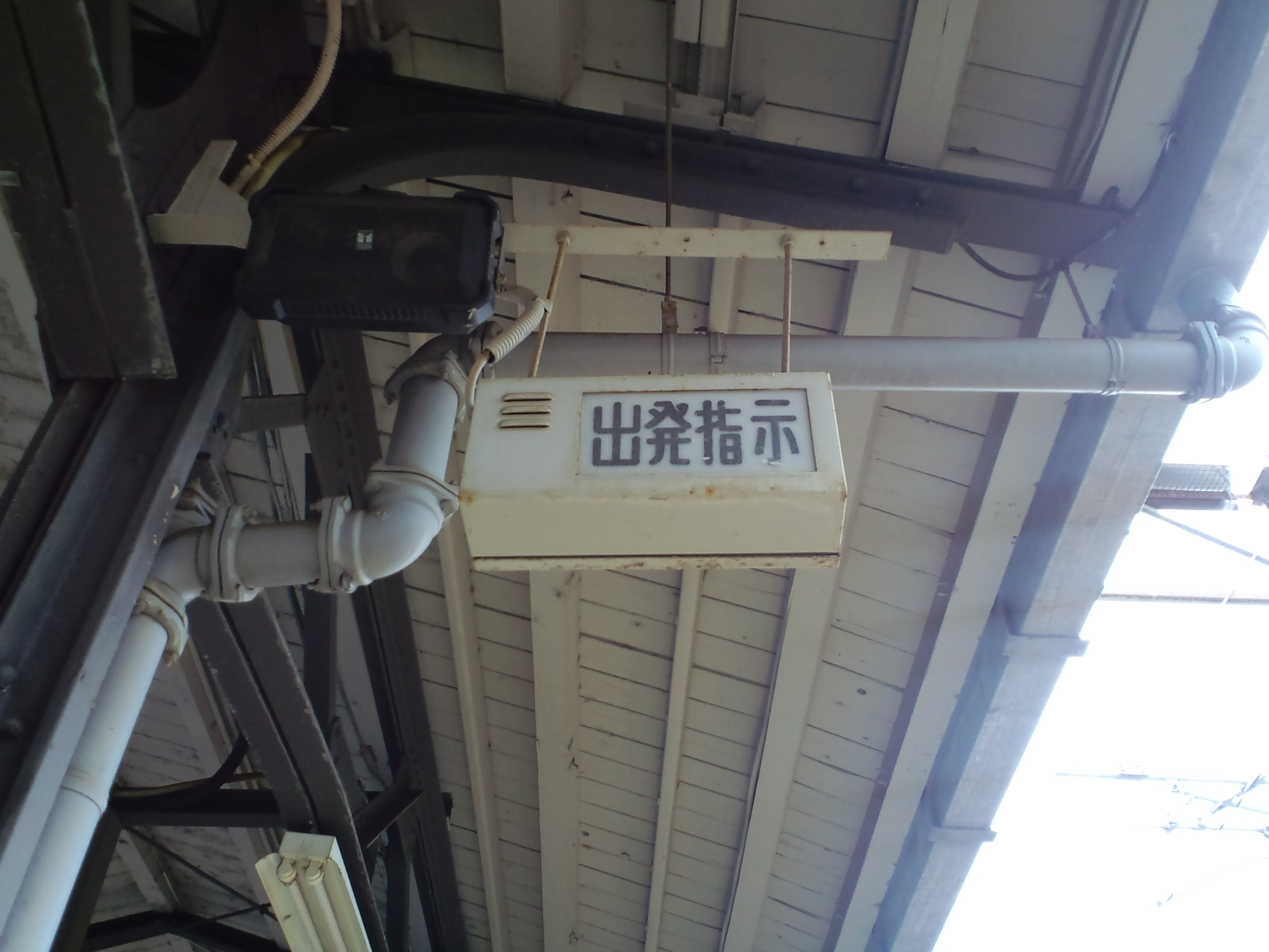 岩見沢駅3・4番ホームの出発指示機